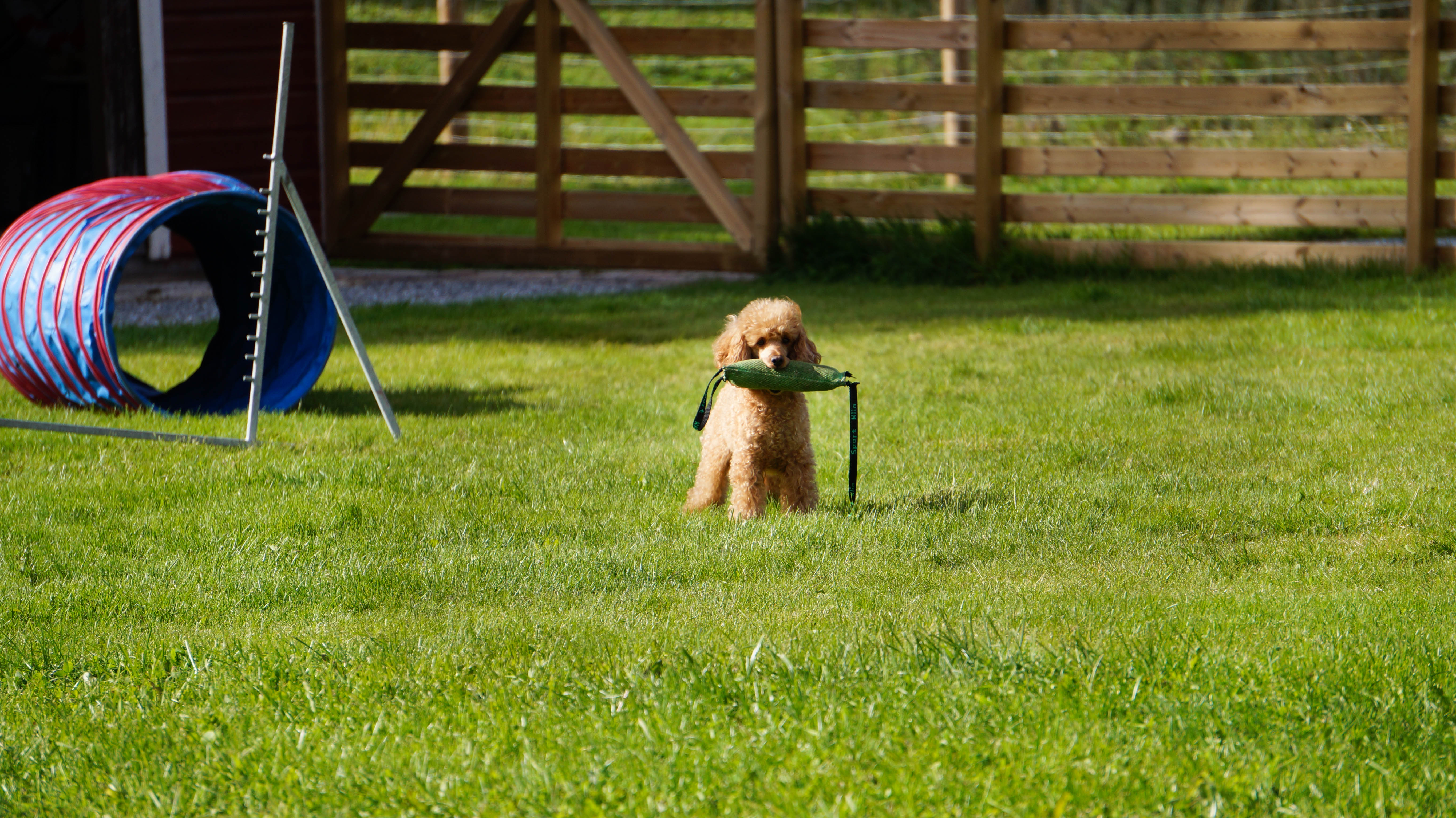 Här tränas en av elevhundarna på skolan.